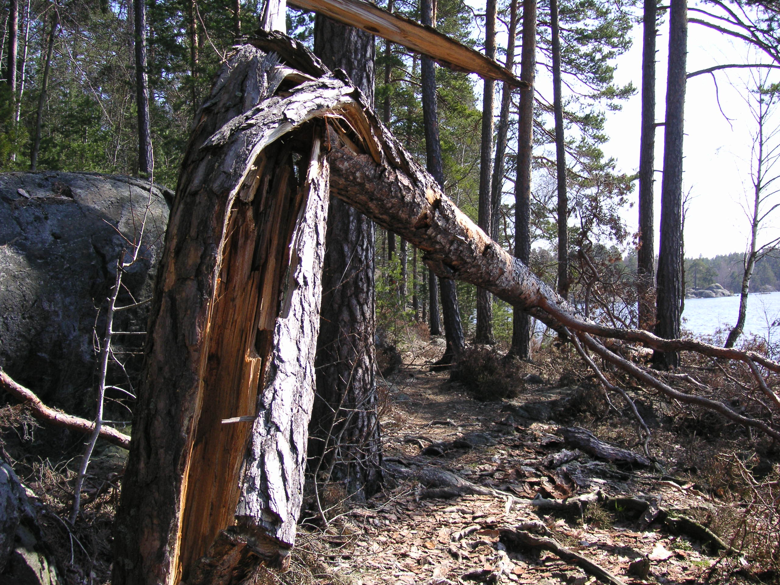 Sjön Gömmaren i Huddinge